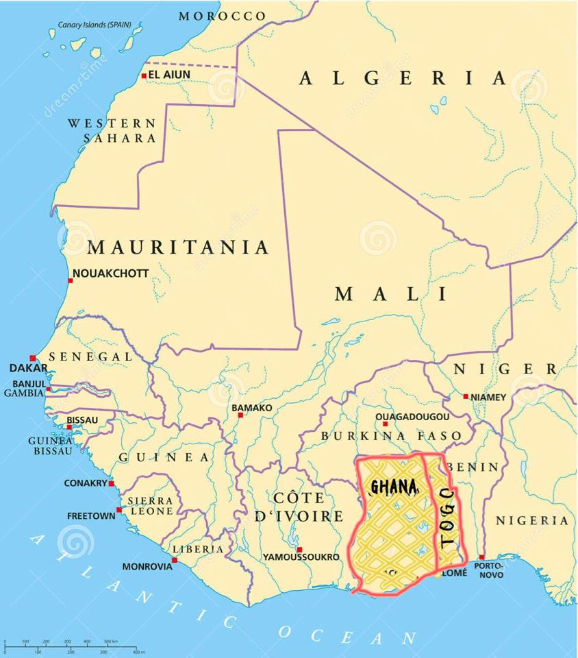 中文（台灣）: 埃維人的分布位置